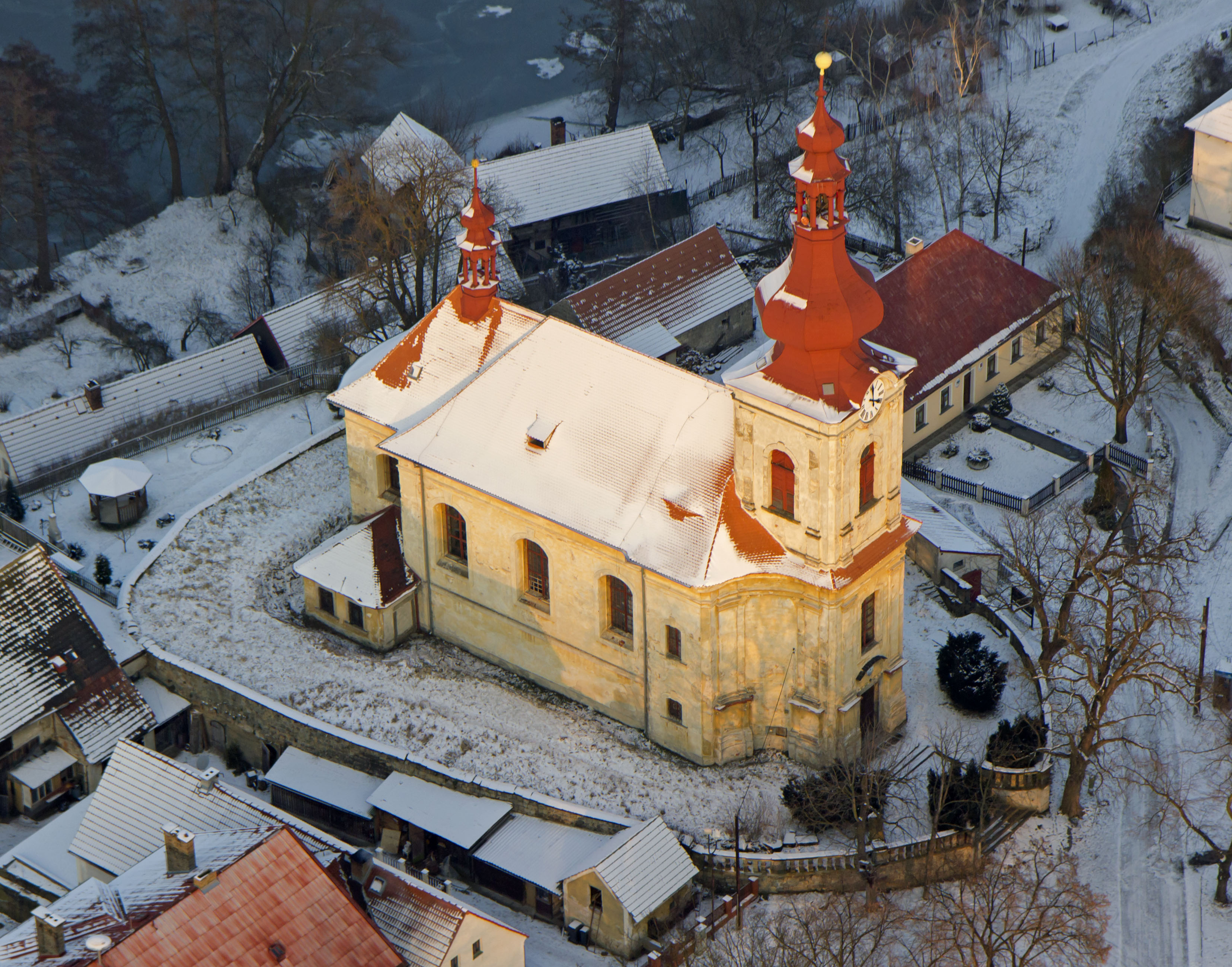 Kostel svaté Maří Magdaleny, Holany.